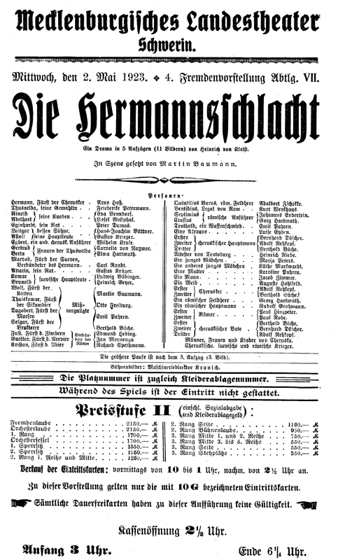 Vorstellungsankündigung "Die Hermannsschlacht"